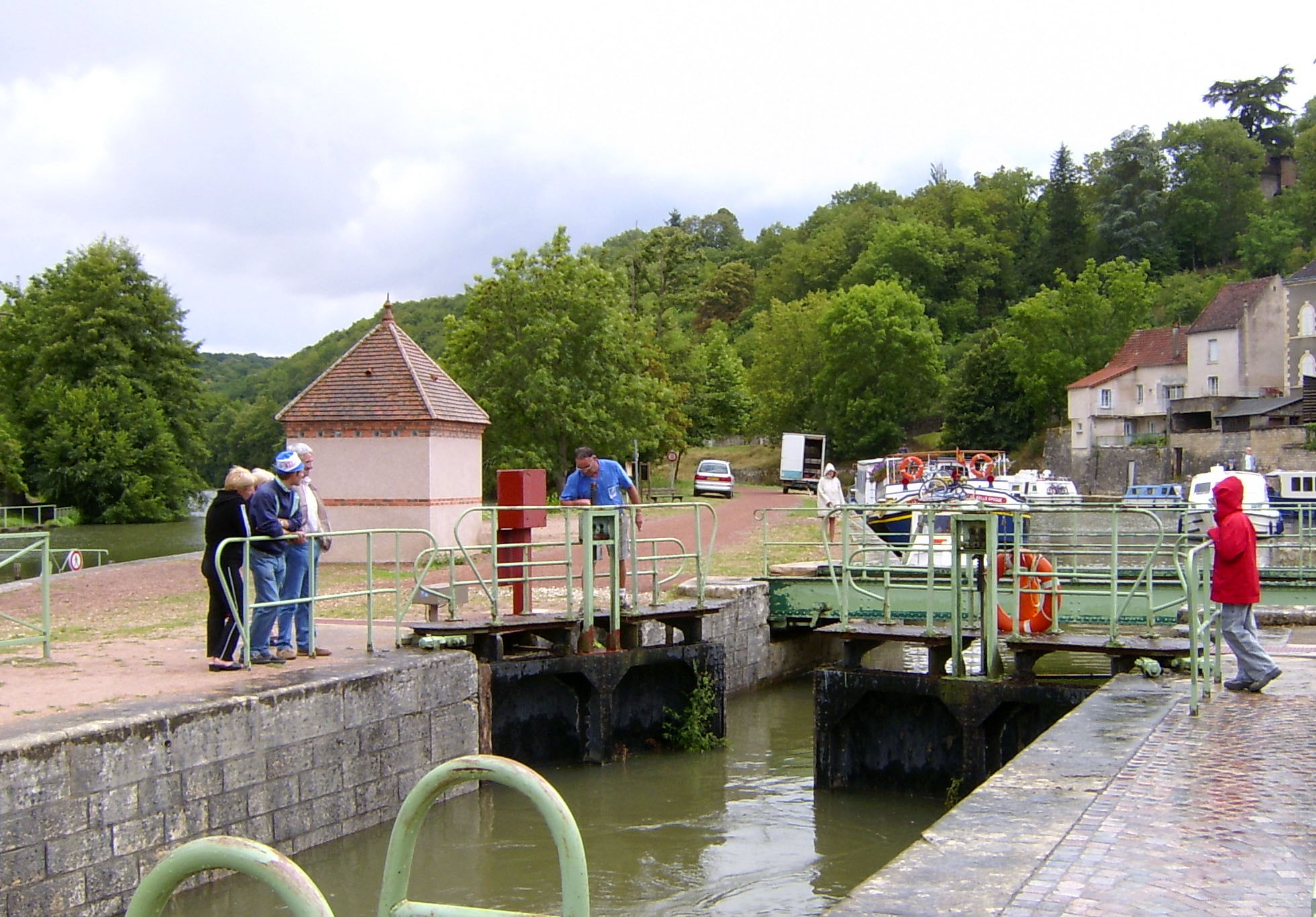 De sluis in Clamecy.